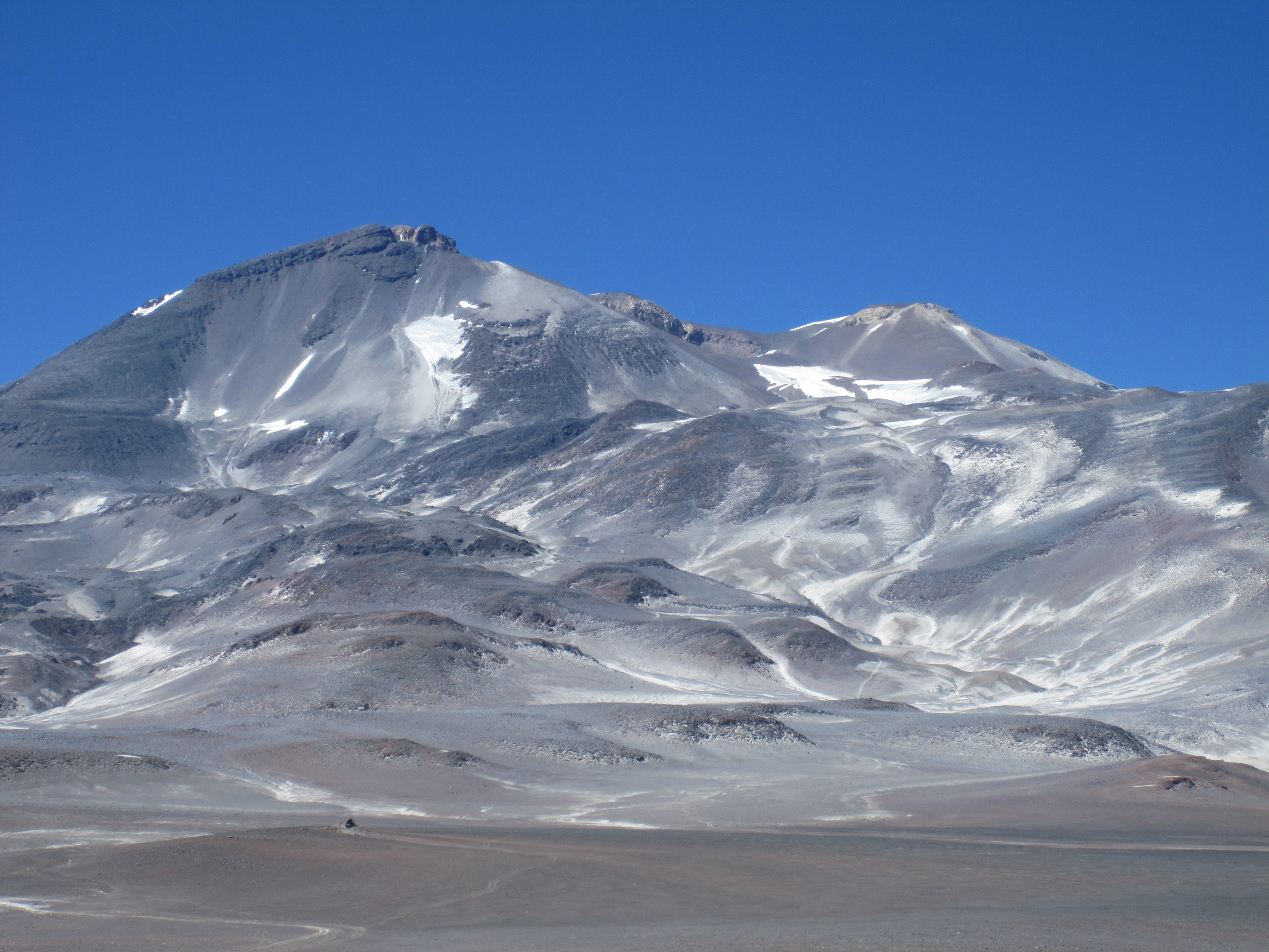 Majestic Ojos del Salado volcano